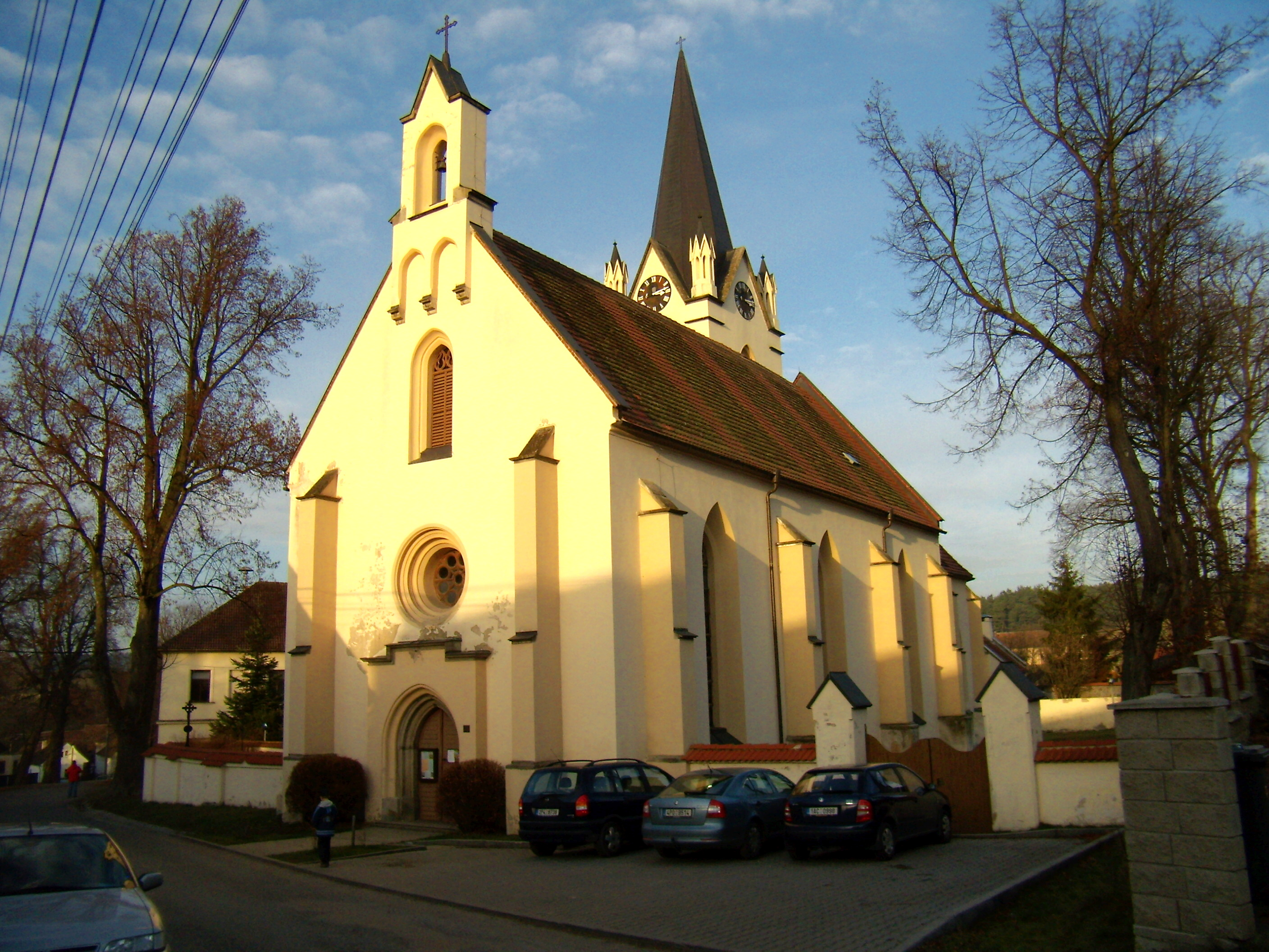 Vrčeň - kostel sv. Vavřince